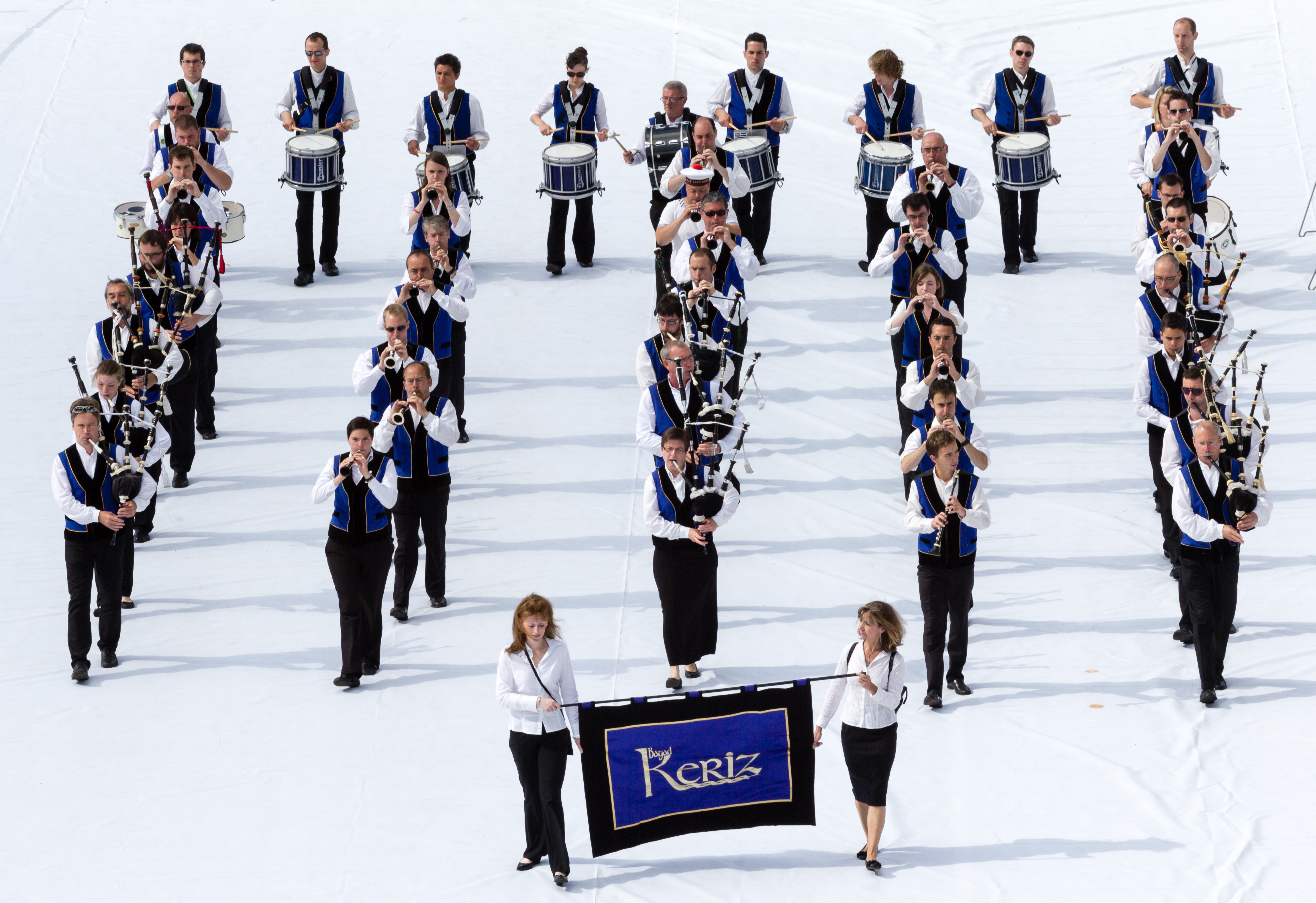 FIL 2012 - Arrivée de la grande parade des nations celtes - Bagad Keriz